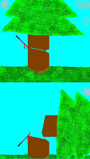 Motorsag/ Trefelling: Fallent Det er mitt (ThorRune) eget bilde, jeg tegna det selv.